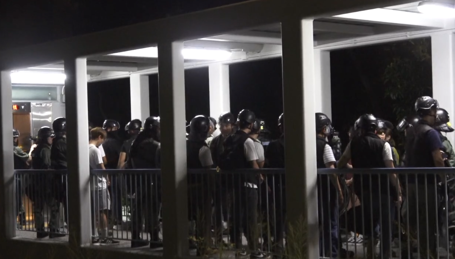 示威者向東涌市中心近富東邨方向逃去，其間警員在行人天橋截查約10多人